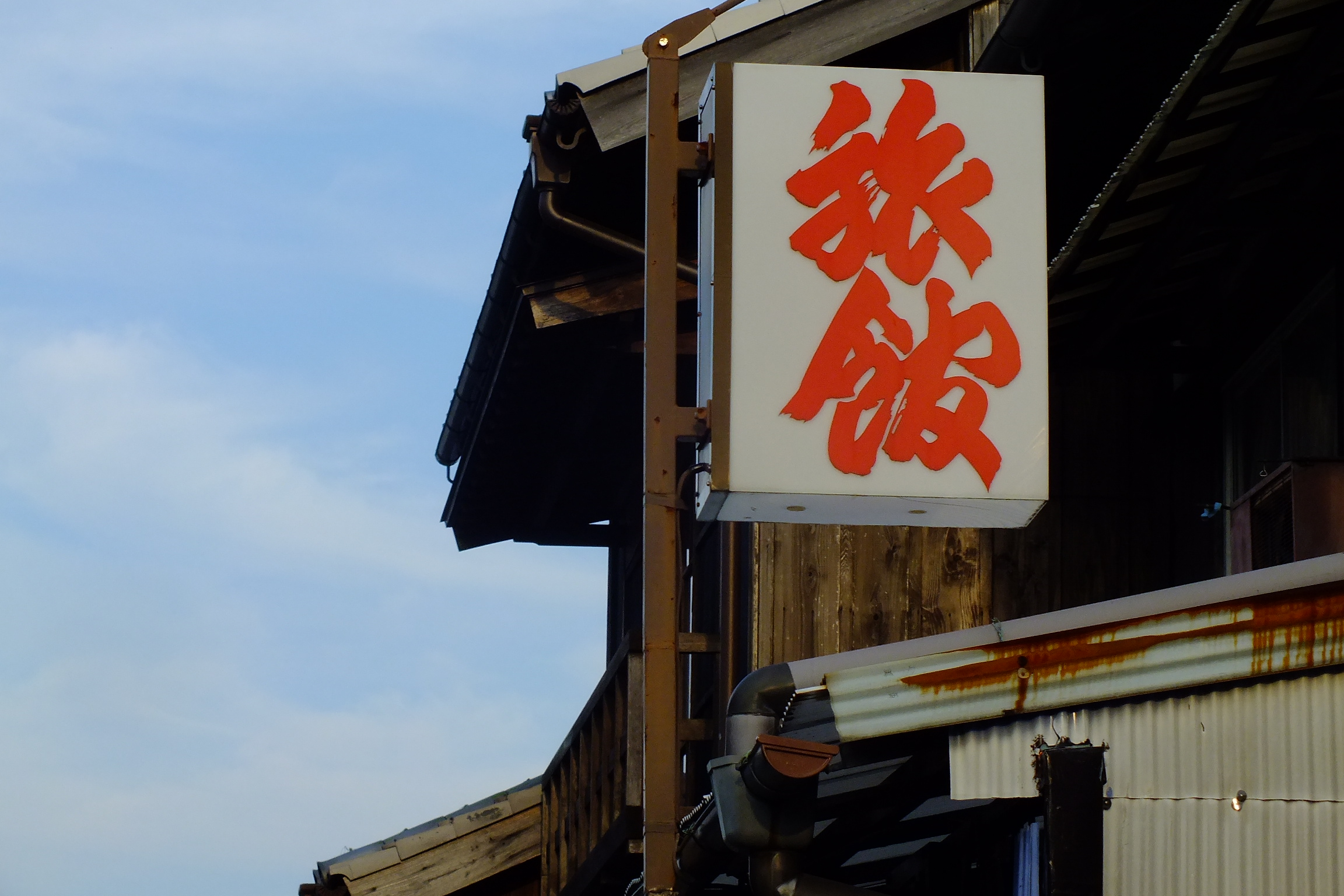 2016-08-05 Tokaido Seki Juku Kameyama City Mie,東海道五十三次 関宿